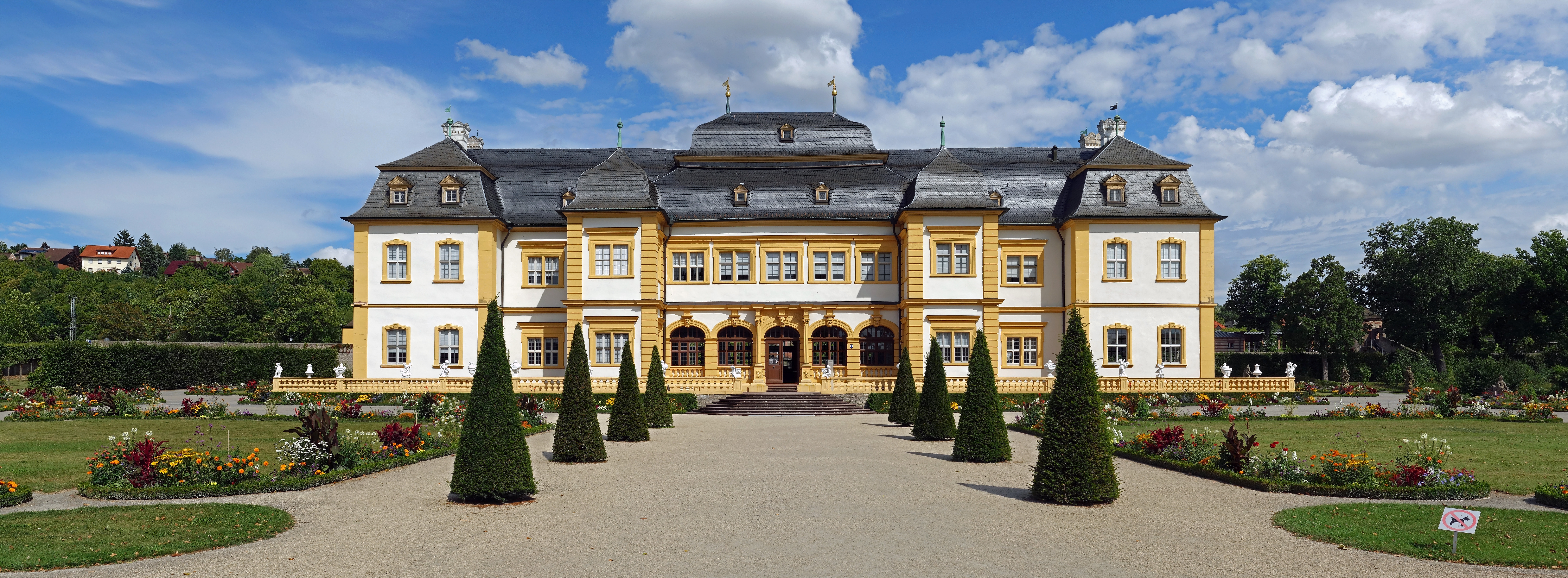 Schloss Veitshöchheim, ehemalige Sommerresidenz der Fürstbischöfe von Würzburg in Veitshöchheim bei Würzburg. Später diente das Schloss den Königen von Bayern. Erbaut wurde es von 1680 bis 1682, letzte Bauarbeiten fanden unter Johann Balthasar Neumann im Jahre 1753 statt.